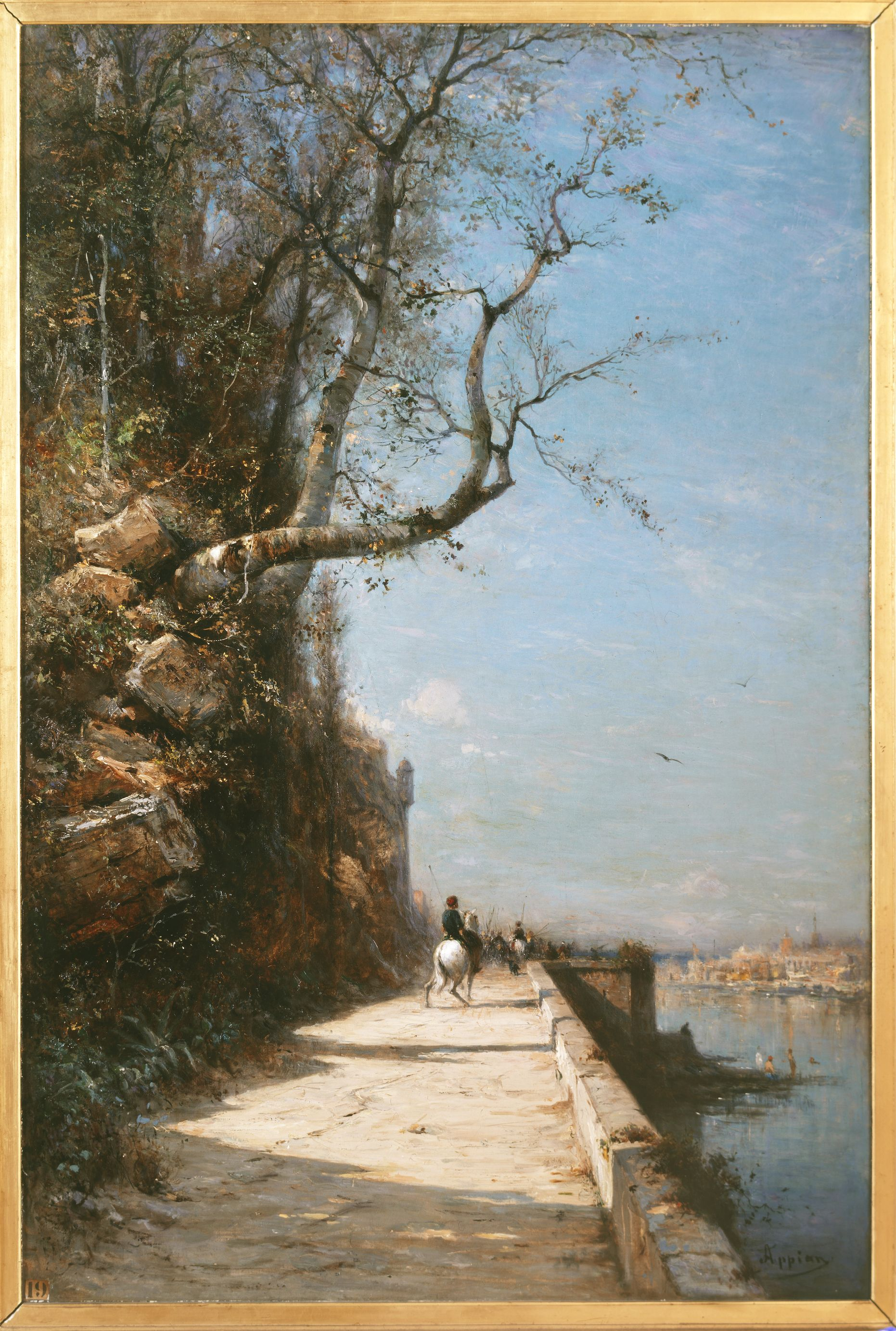 Donation Muguette et Paul Dini, n°1, 1999 Musée Paul-Dini, musée municipal, Villefranche-sur-Saône, inv. 1999.1.7 Copyright : Didier Michalet